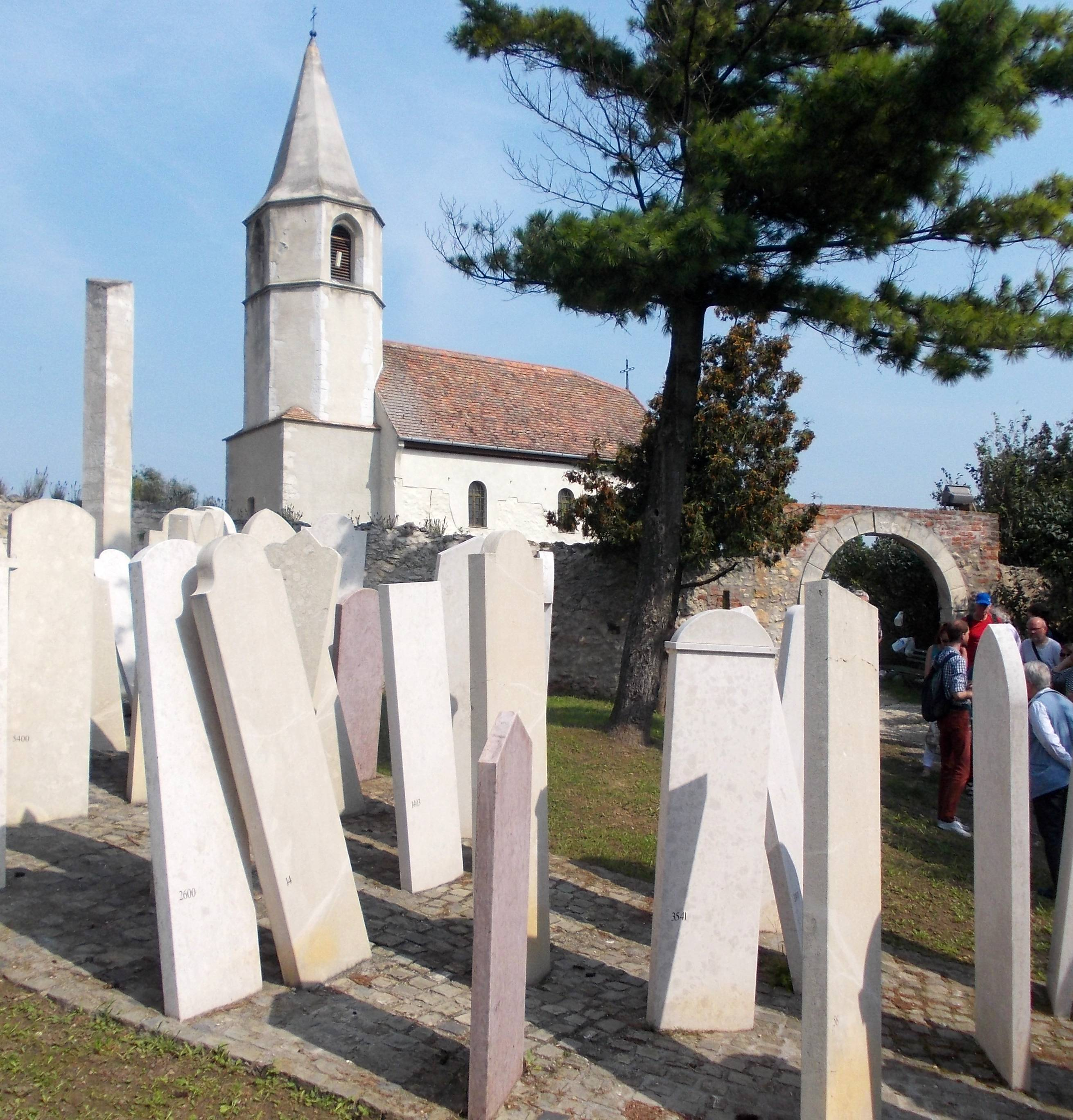 Gedenkstätte in Balf - Mahnmal an der Mauer zu Friedhof und Kirche - Im Hintergrund die Kirche